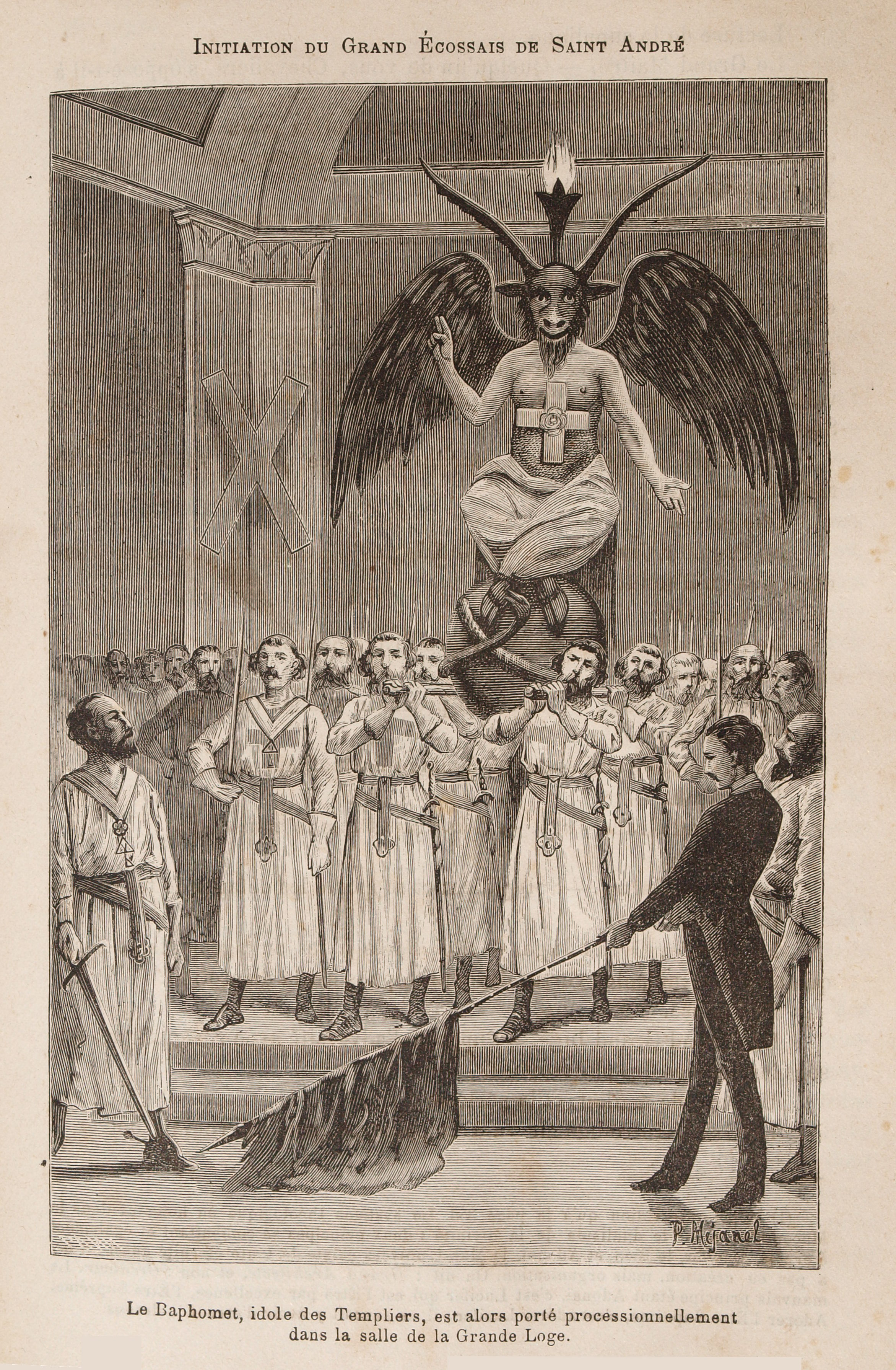 Une des gravures du document de Léo Taxil, Les Mystères de la Franc-Maçonnerie, Paris, 1886.